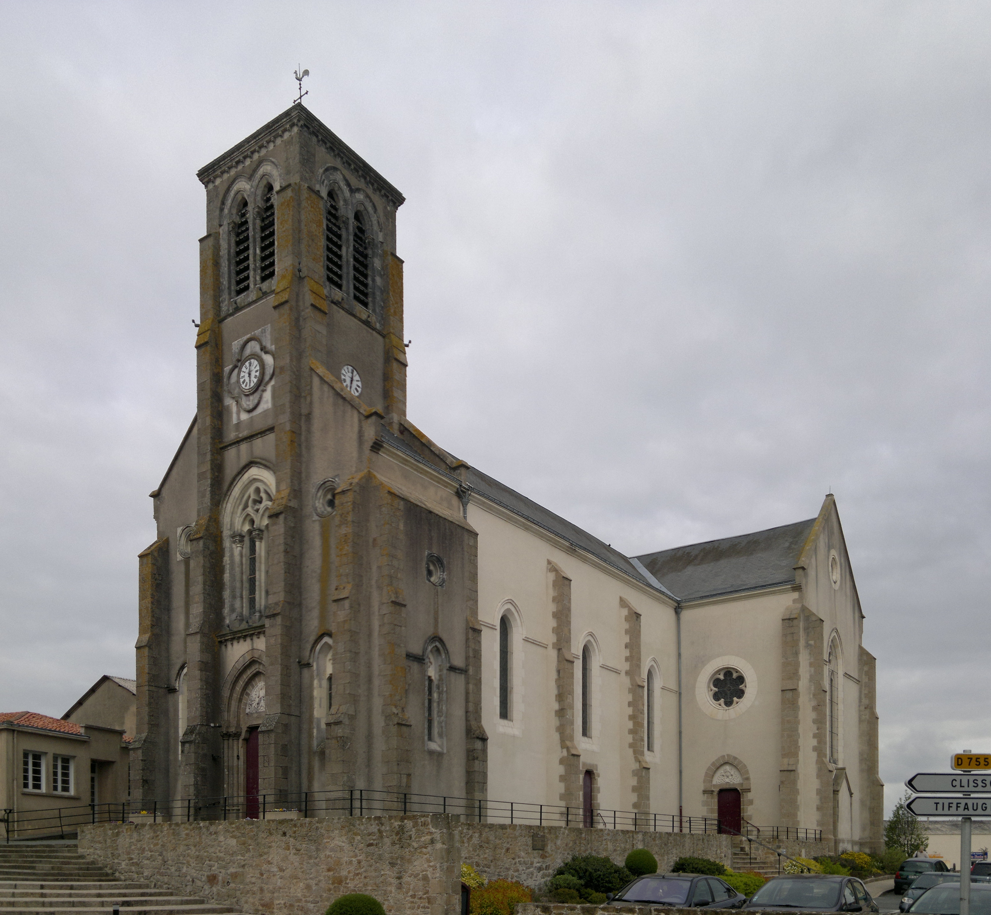 Église Notre-Dame de l'Assomption (1858), Fr-85-Les Landes-Genusson.